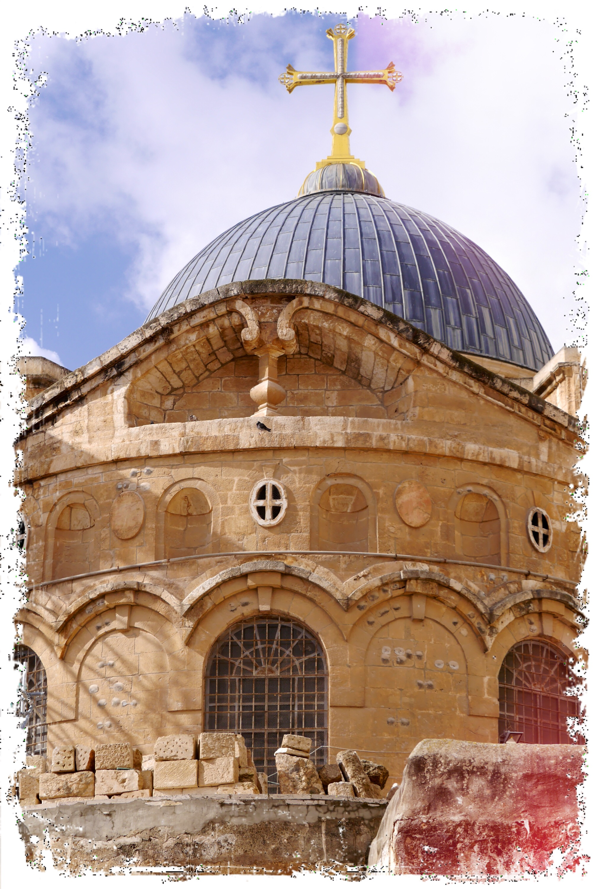 Patriarcat Copte de Jérusalem, C'est une des stations du chemin de croix. À cet endroit supposé Jésus tombe pour la troisième fois